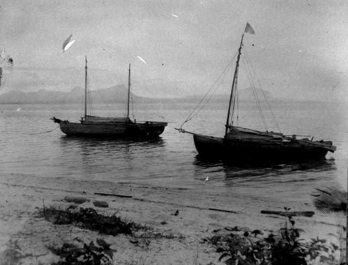 Foto. Militaire Exploratie van Nederlands Nieuw-Guinea 1907-1915. Twee kleine zeilschepen voor de kust